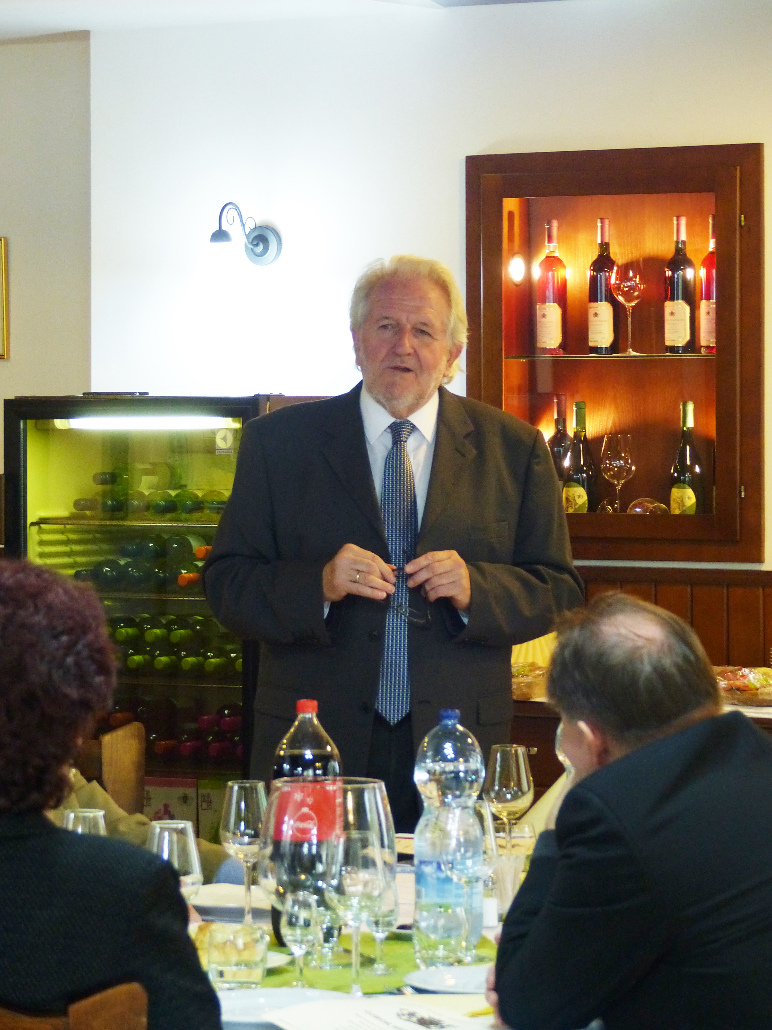 Kállay Miklós (BCE-SZBI) bemutatója. A felvétel 2016. december 1-én, csütörtökön készült Nagyrédén. A Nagyrédei Szőlők Borforgalmazási Kft. központja, Újbor bemutatás.